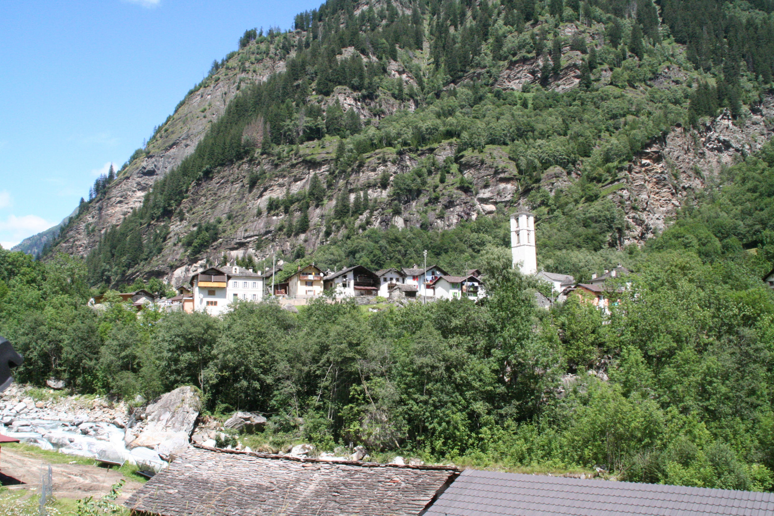 Cauco